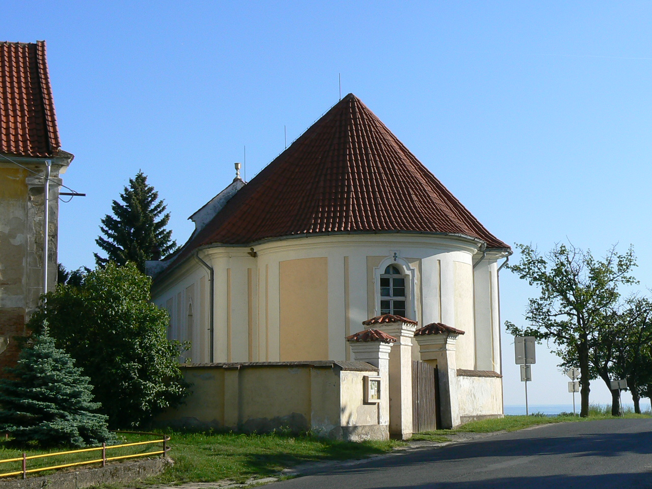 Toleranční evangelický kostel v obci Vysoká na Mělnicku